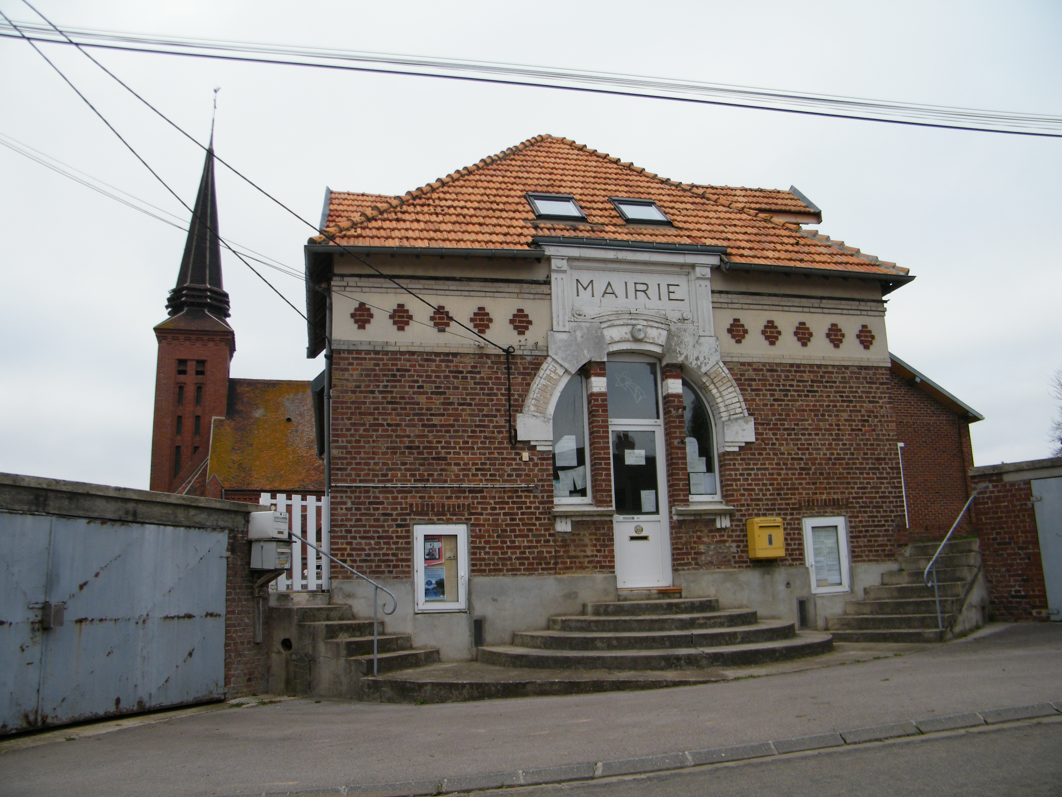 Bâtiments communaux.